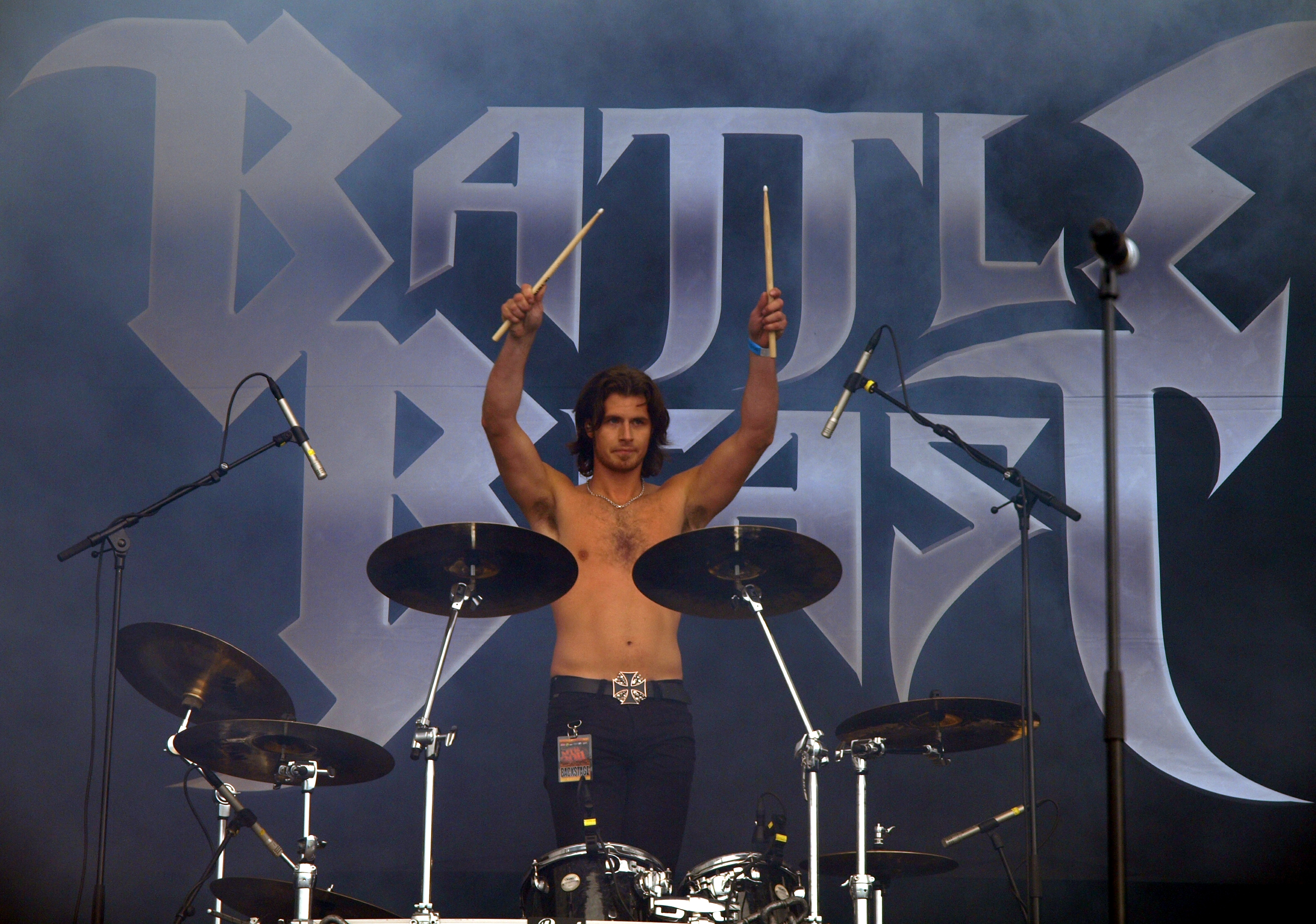 Battle Beast live am Myötätuulirock 2011